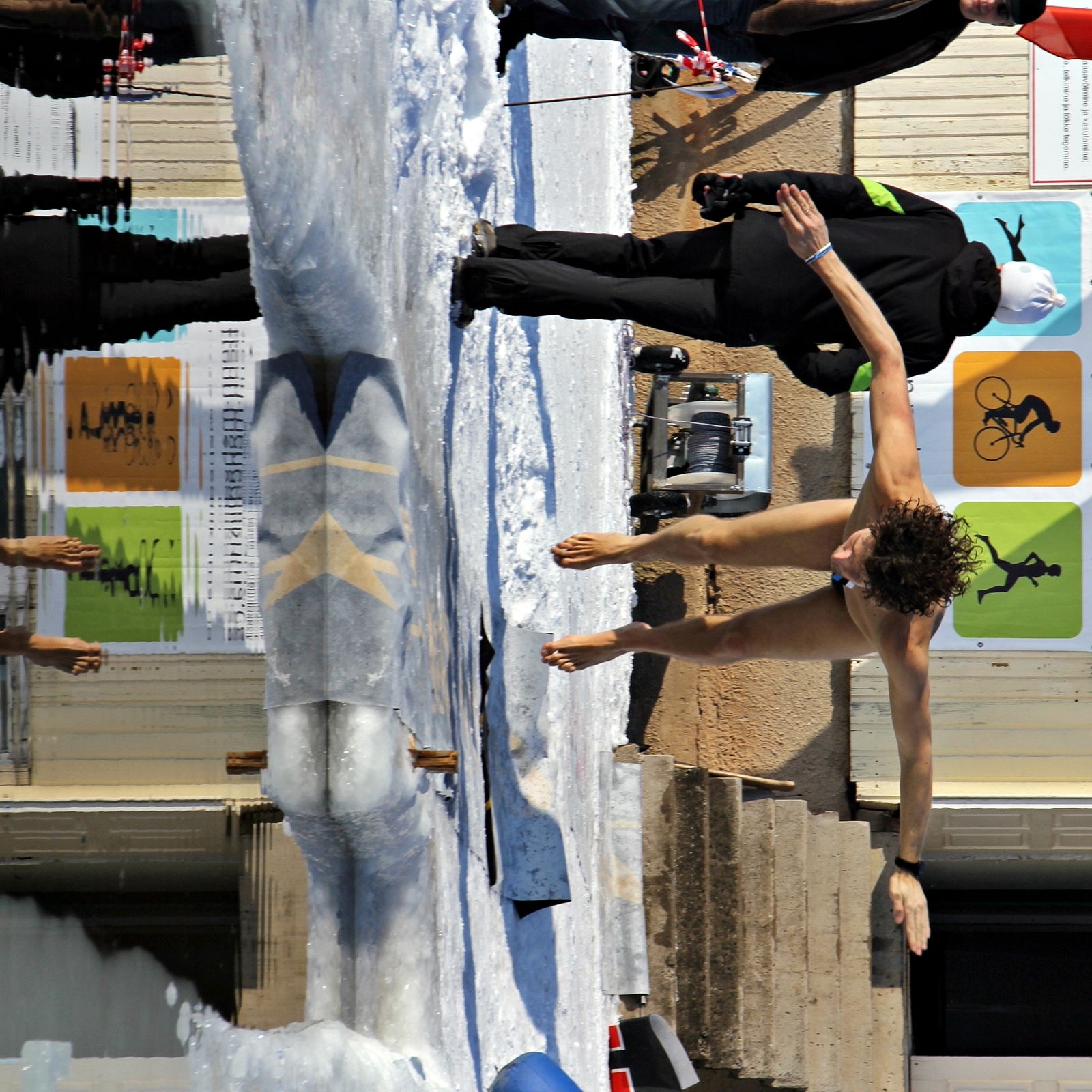 Talvine ujumine. Korraldaja - triatloni klub Trismile.